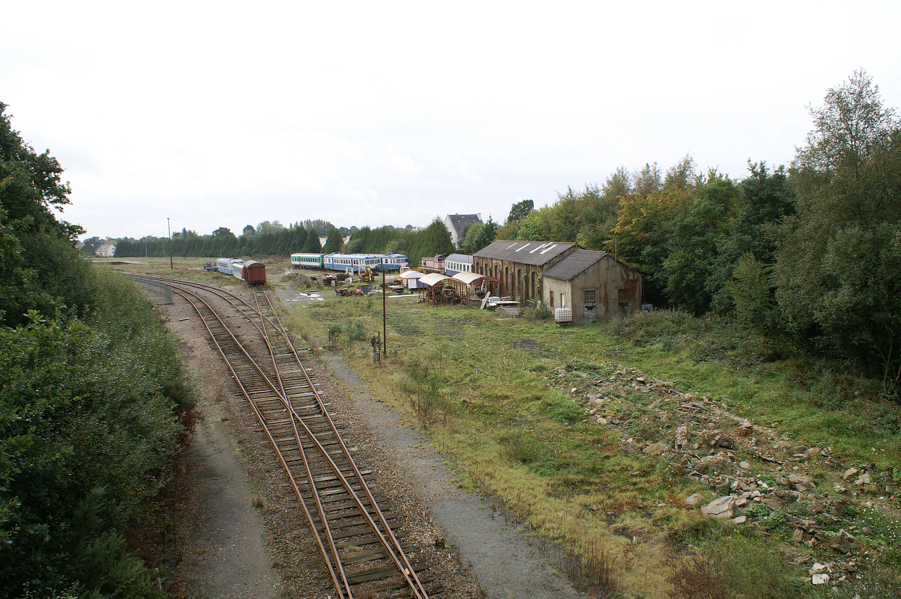 En gare de Loudéac le dépôt matériel de l'association Chemins de fer du Centre-Bretagne (CFBC). Situé à l'entrée de la gare en venant de Saint-Brieuc, il comprend l'ancienne remise à locomotives du Réseau Breton.